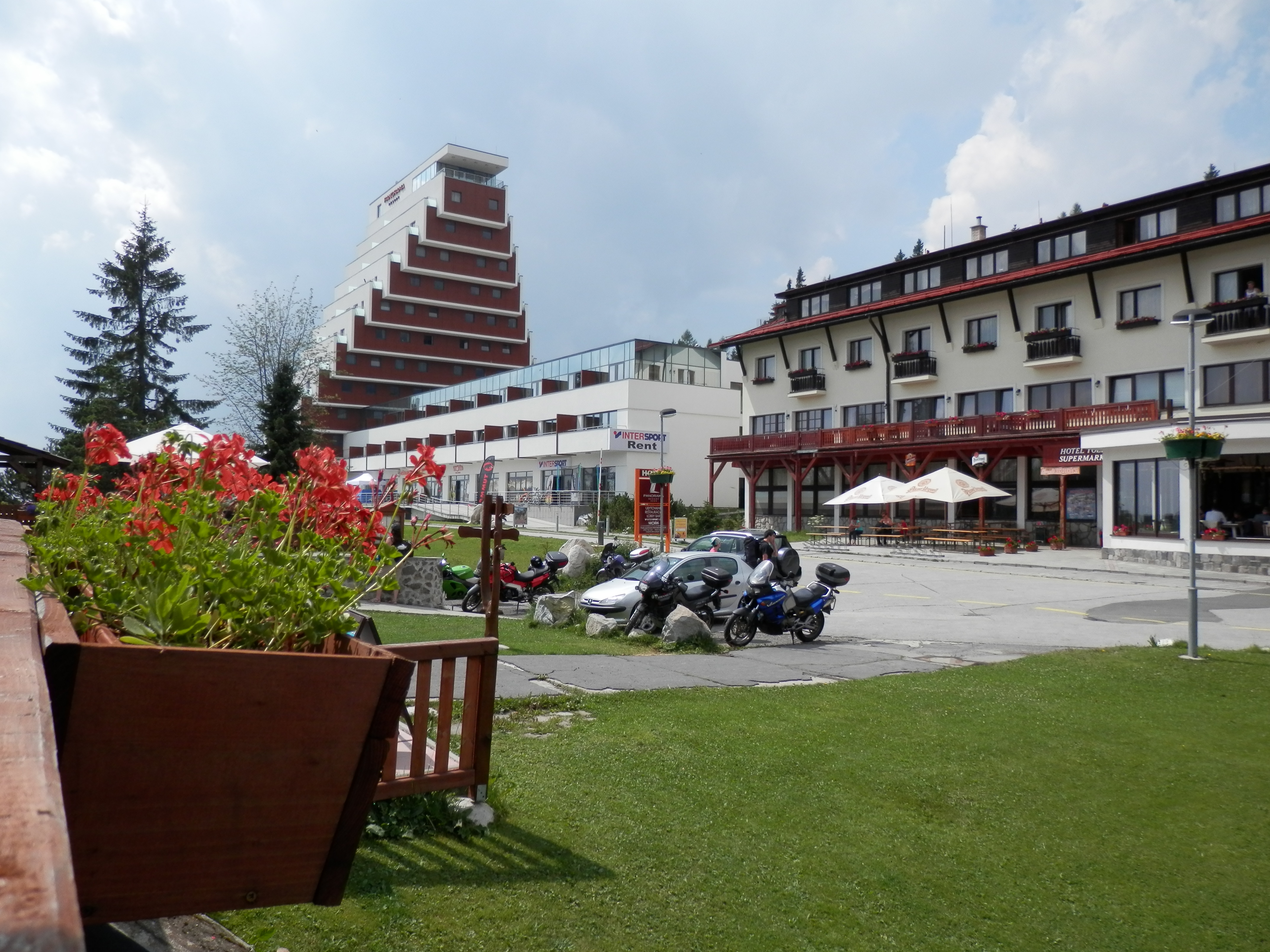 Tatranská osada Štrbské Pleso. Časť obce Štrba.Okres Poprad.